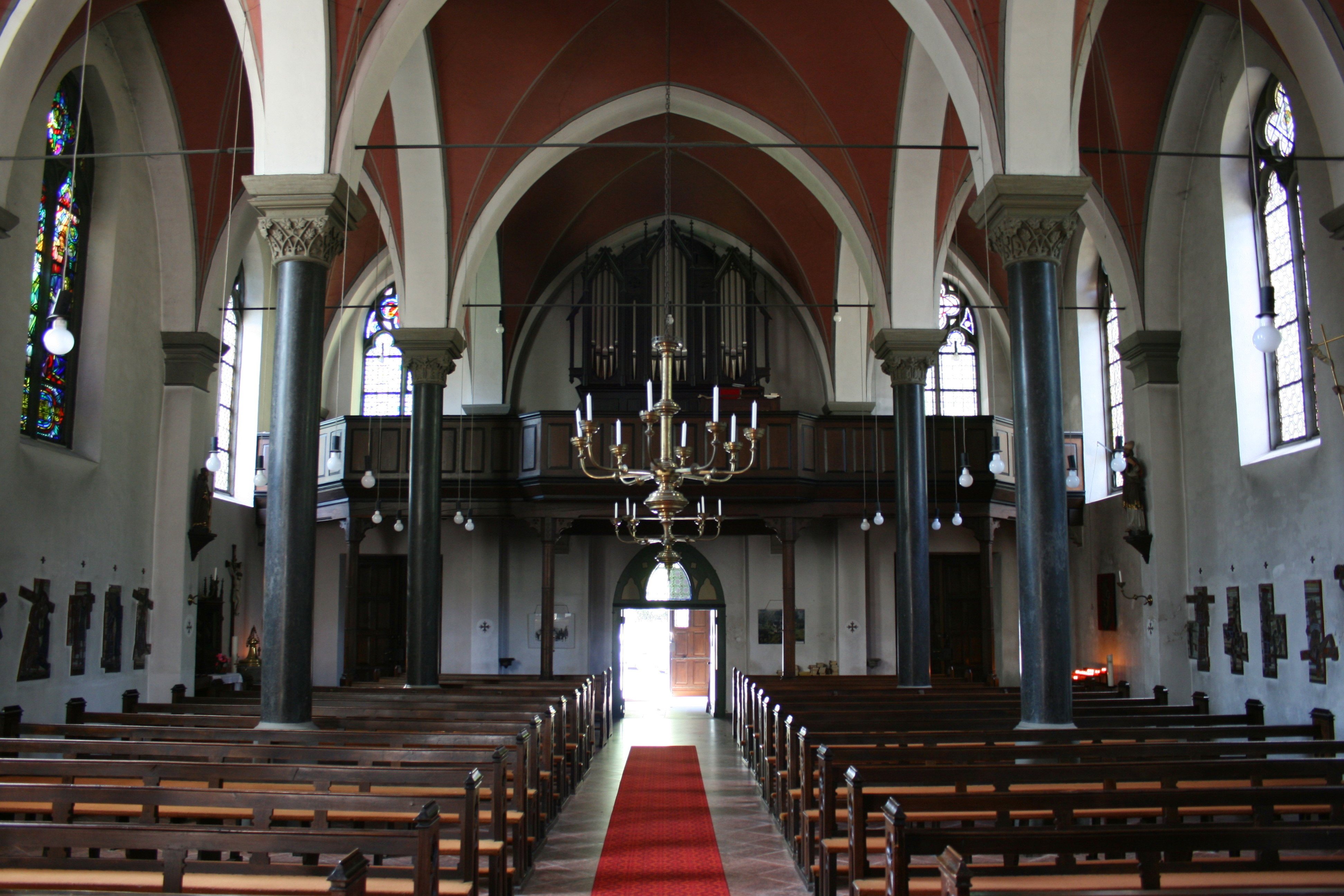 Sankt Johann Baptist in Marienheide-Gimborn